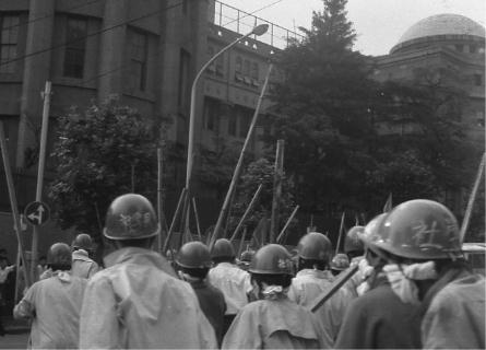 中央大学での集会を終えて、駿河台の通りに出てきたブントの集団